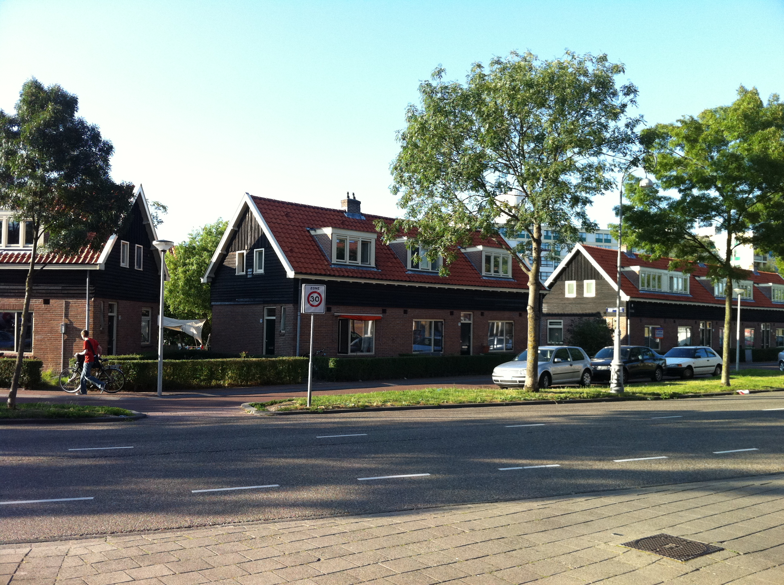 Woningen langs de Distelweg in nooddorp Disteldorp, gebouwd door de Gemeentelijken Woningdienst Amsterdam